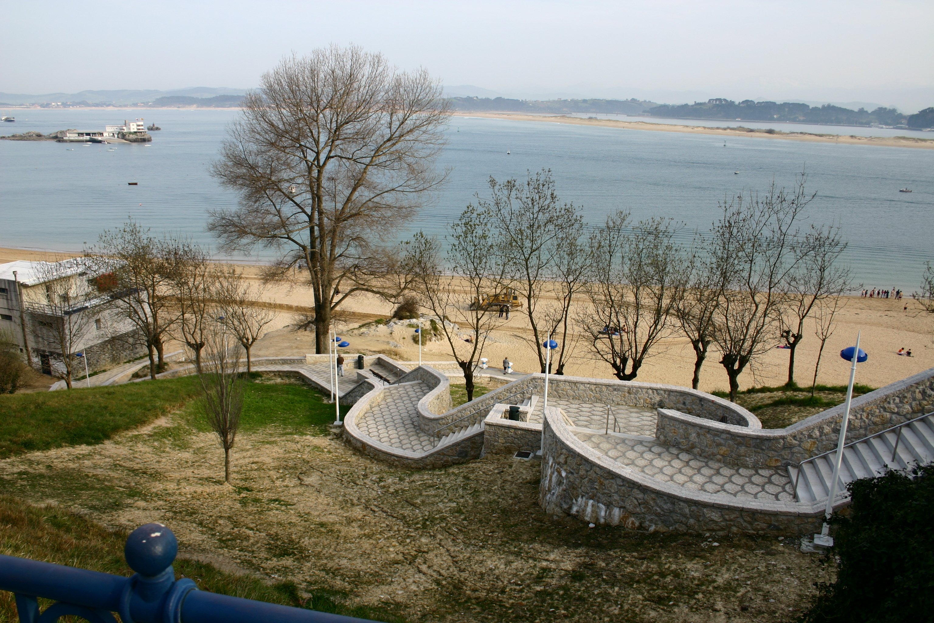 Escalera de bajada a la Playa de la Magdalena.